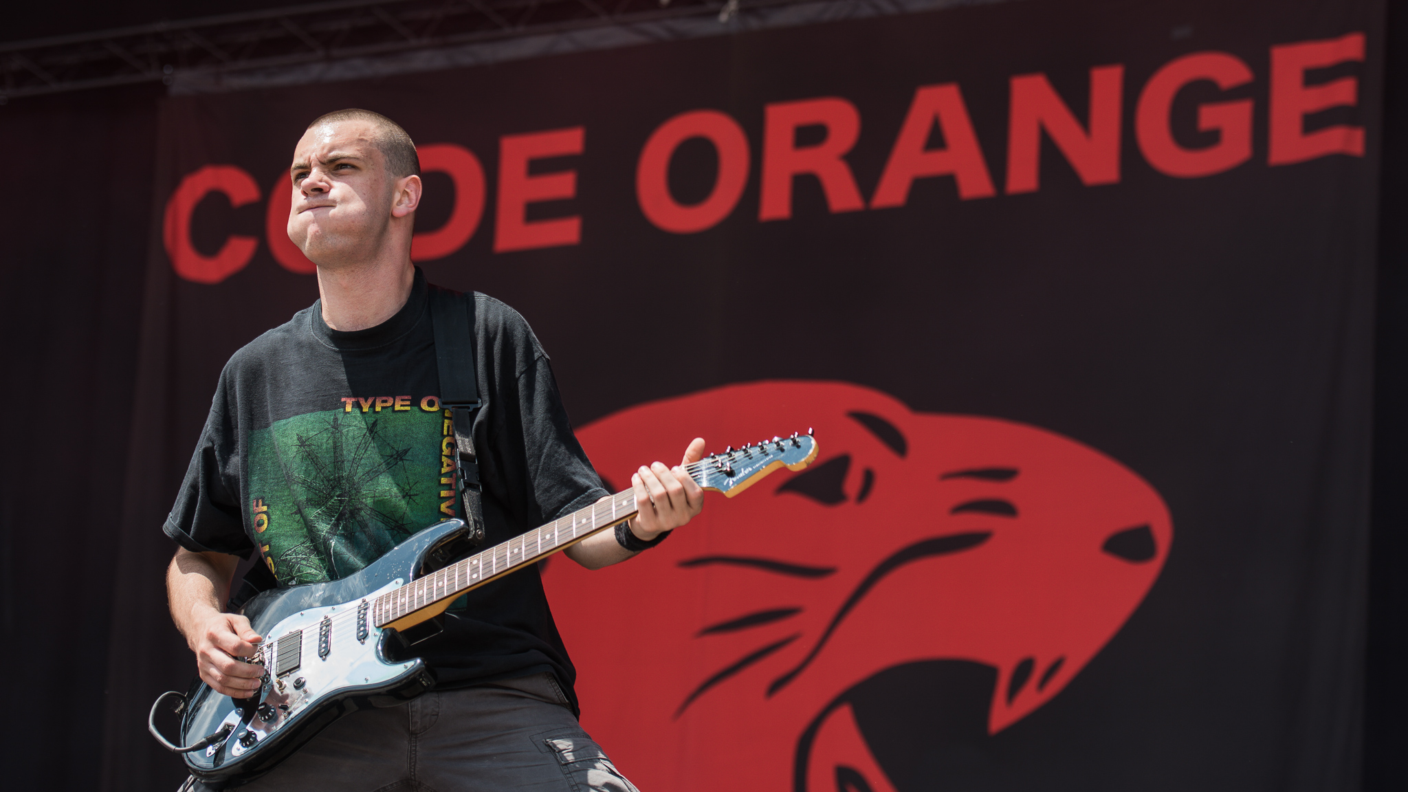 ARGO-Konzerte,Code Orange,Dominic Landolina,Konzert,Livekonzert,Livemusik,Musik,RiP,Rock im Park 2017,Zeppelin Stage